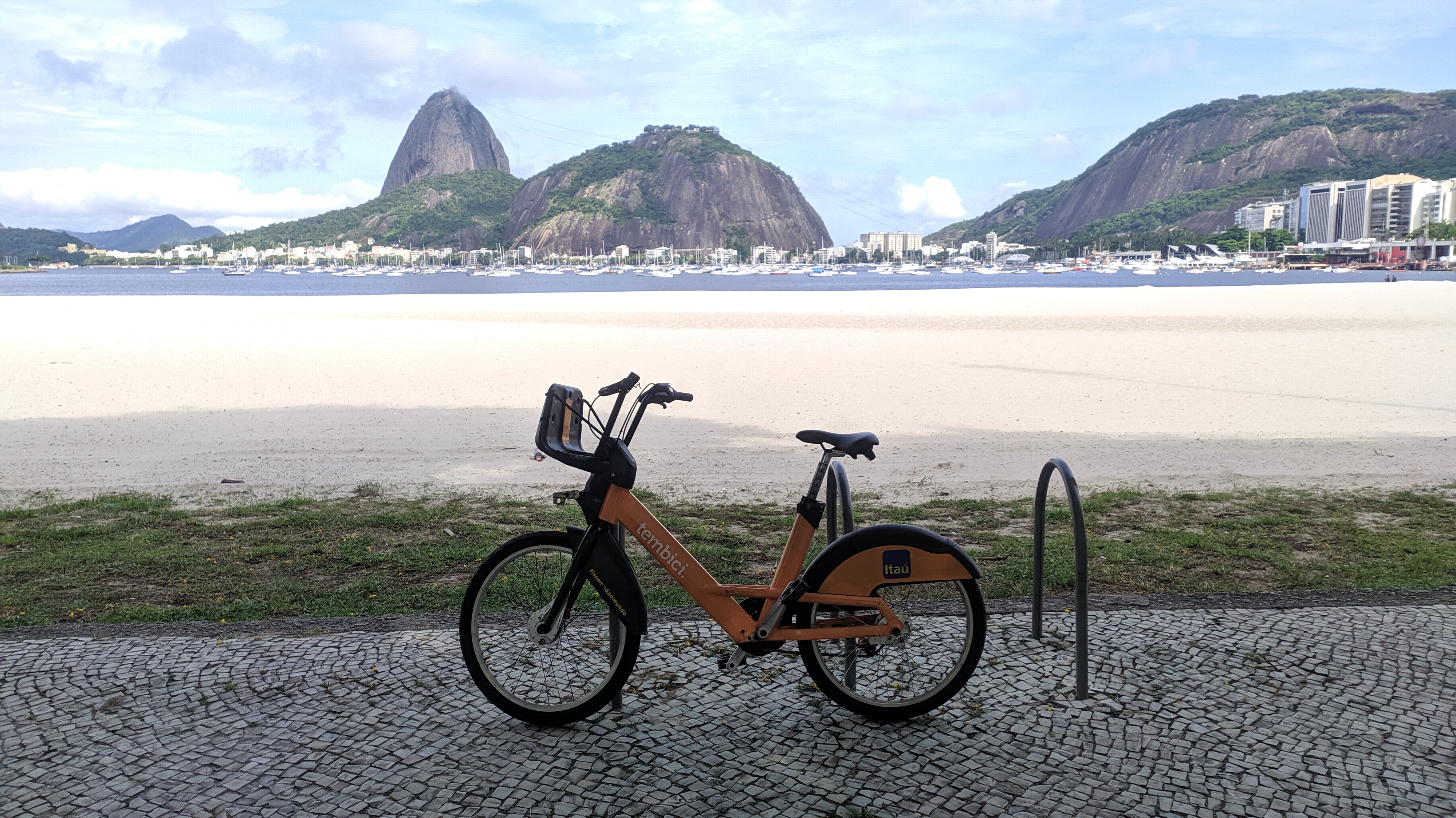 Bicicleta do Bike Rio modelo "Fit" da PBSC Urban Solutions.